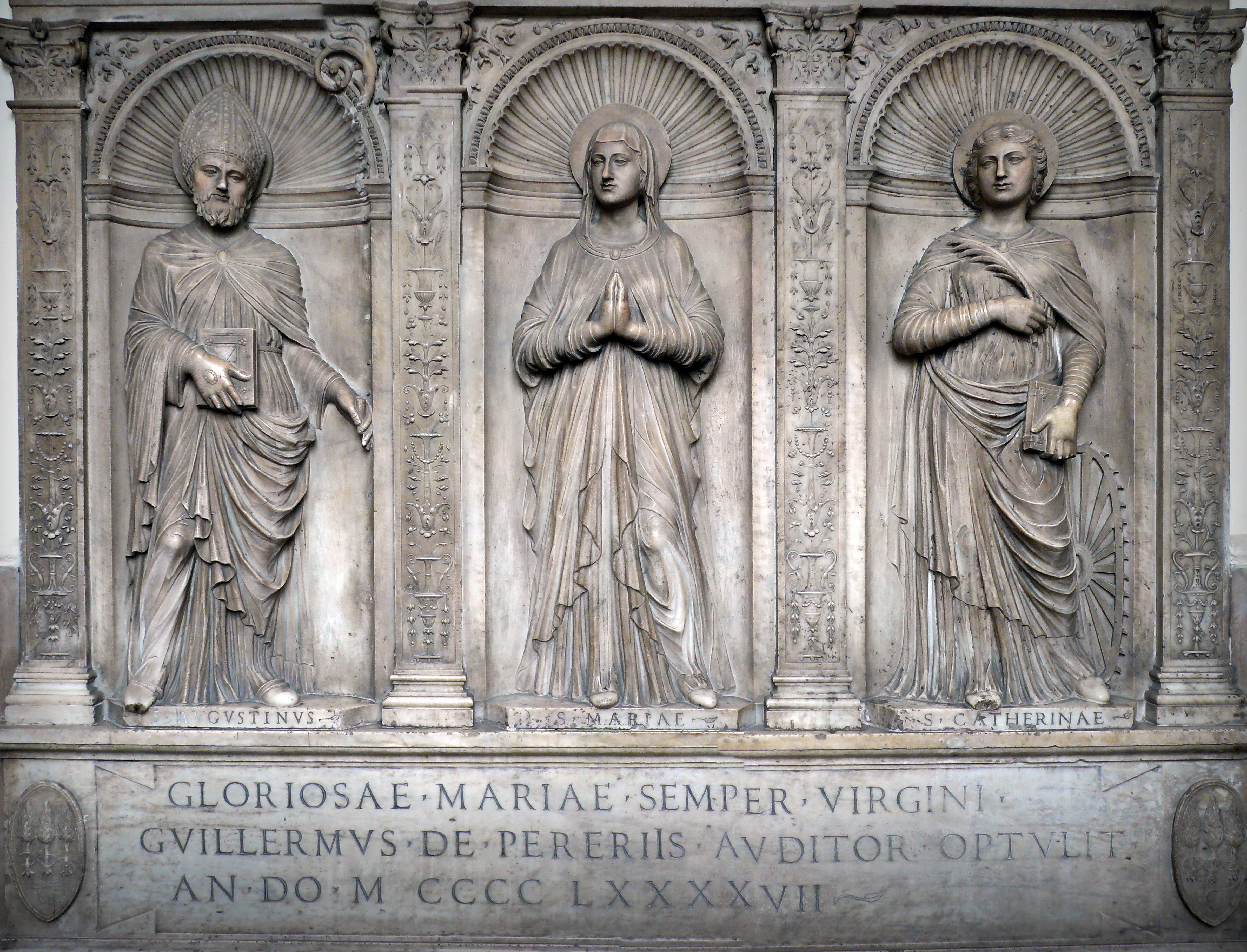 Rom - Basilika Santa Maria del Popolo